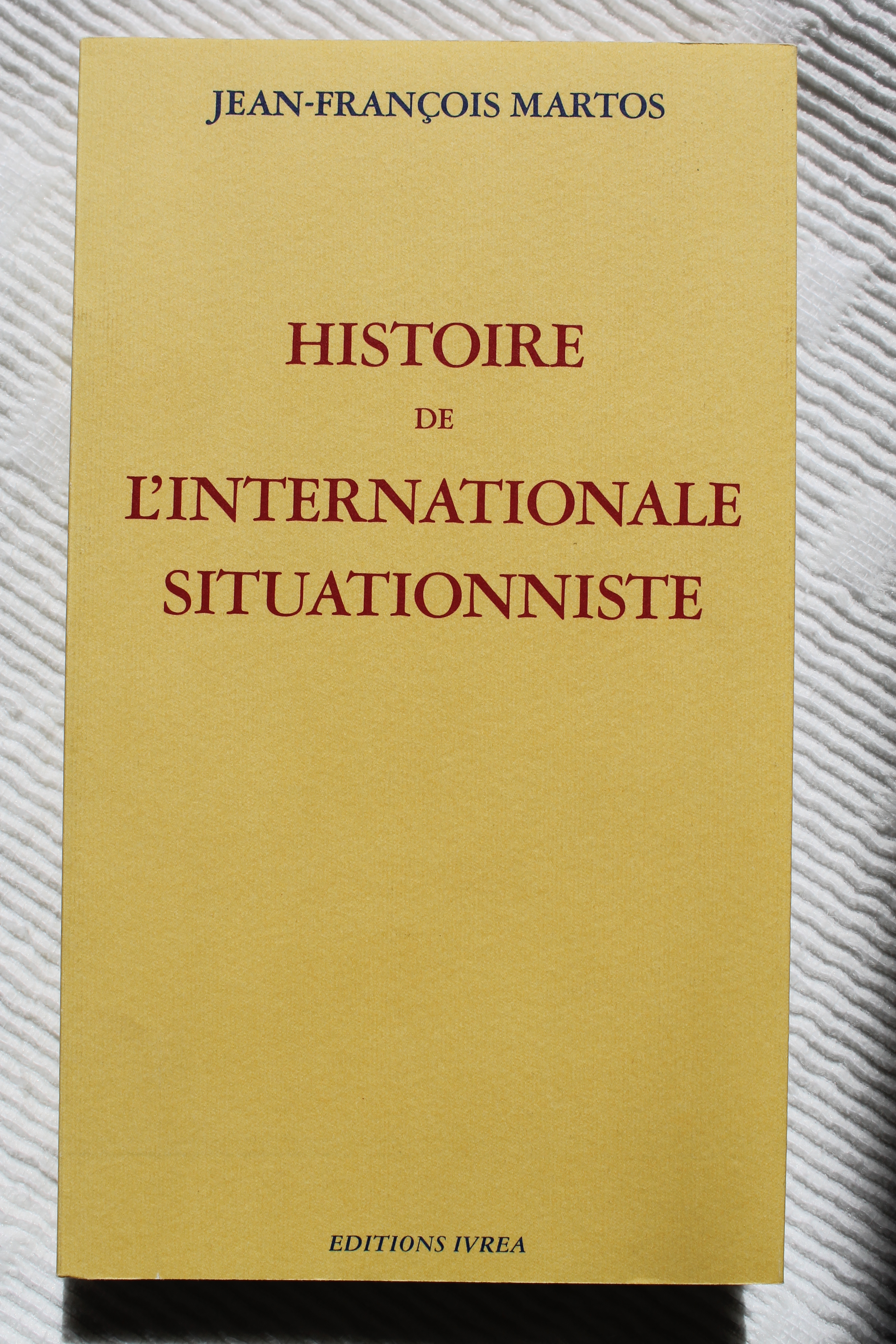 Couverture du livre de Jean-François Martos, "Histoire de l'Internationale situationniste", Éditions Ivrea